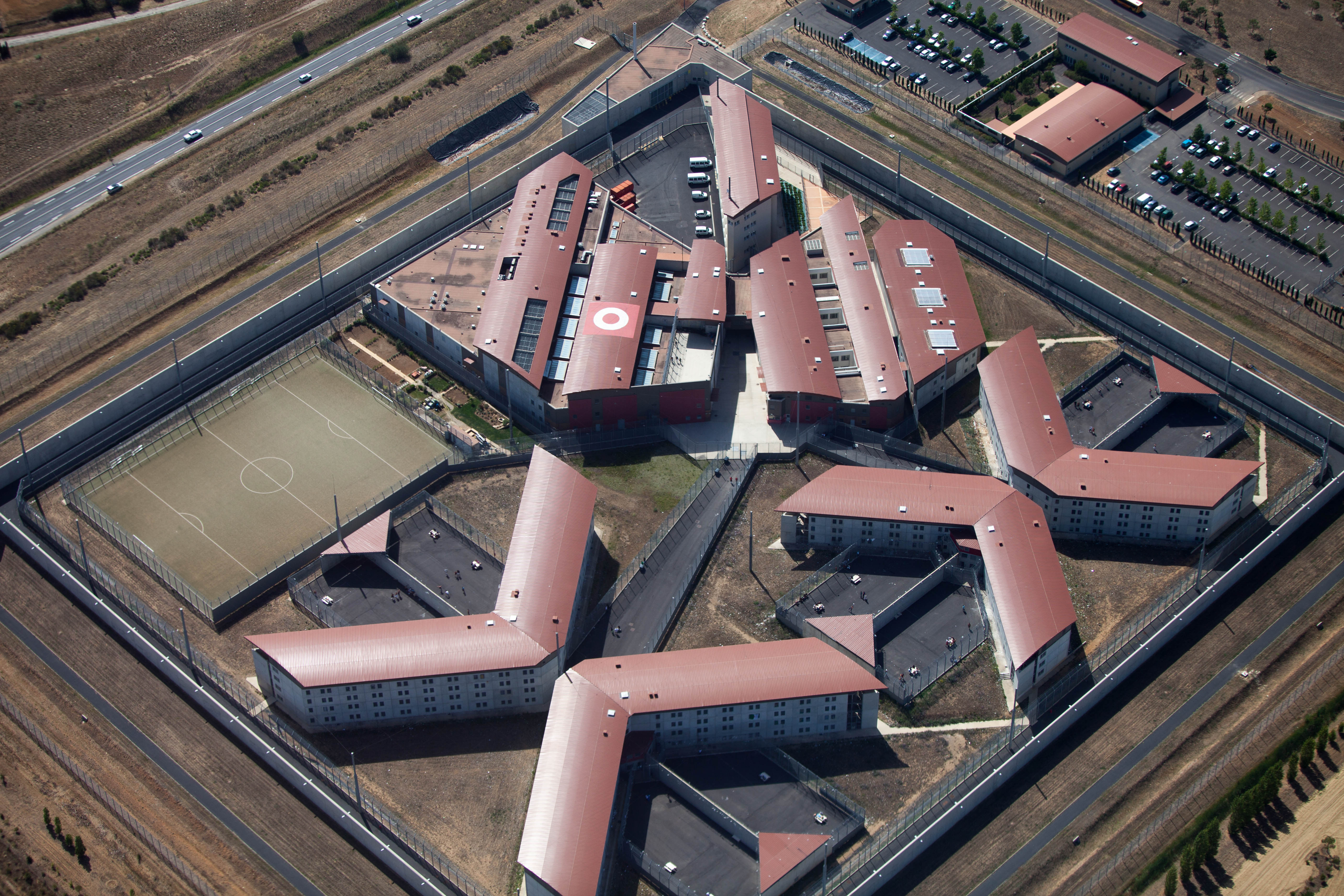 Prison near Bézier